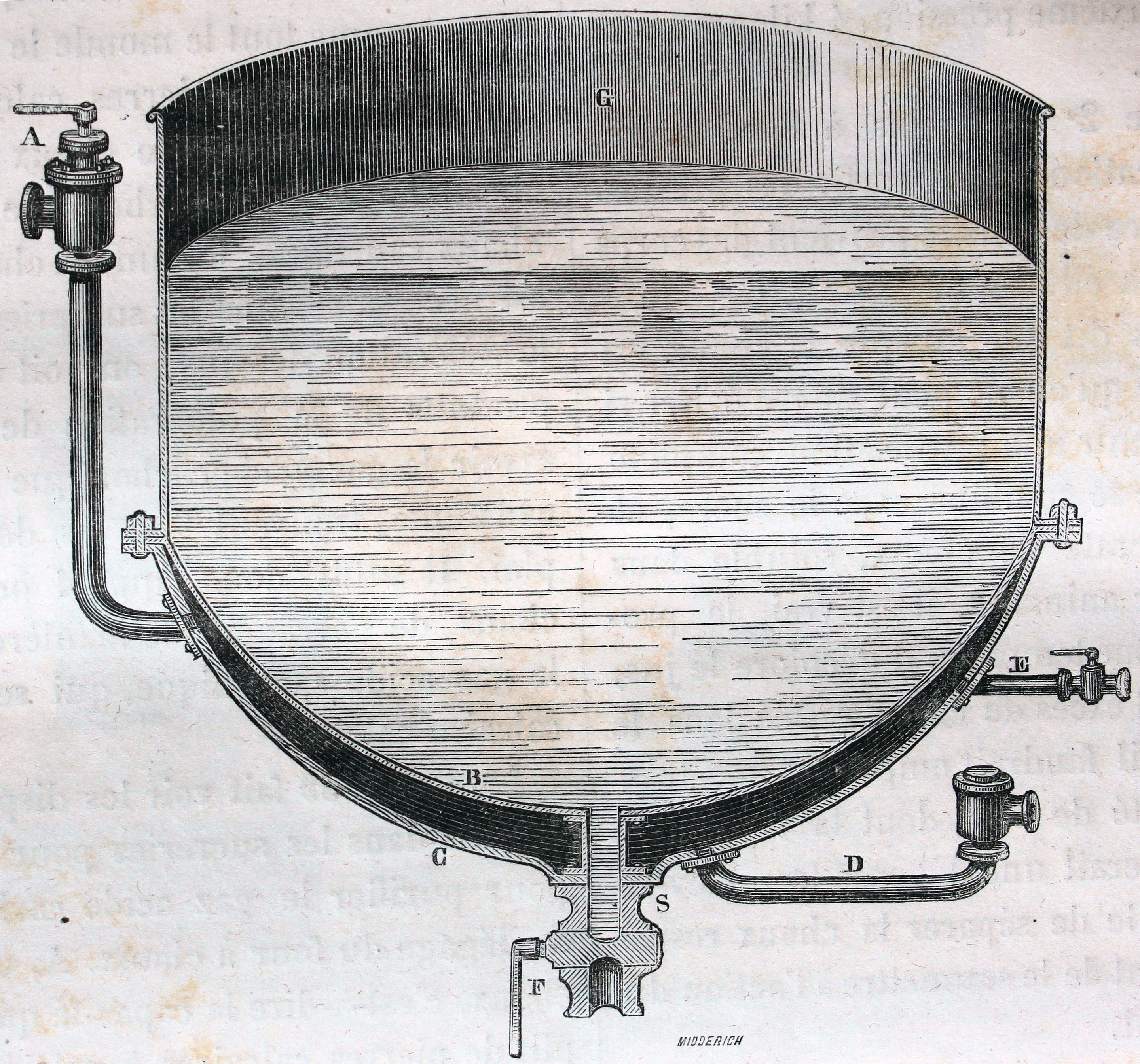 Ilustraciones de la obra : Les merveilles de l'industrie ou, Description des principales industries modernes / par Louis Figuier. - Paris : Furne, Jouvet, [1873-1877]. - Tome II